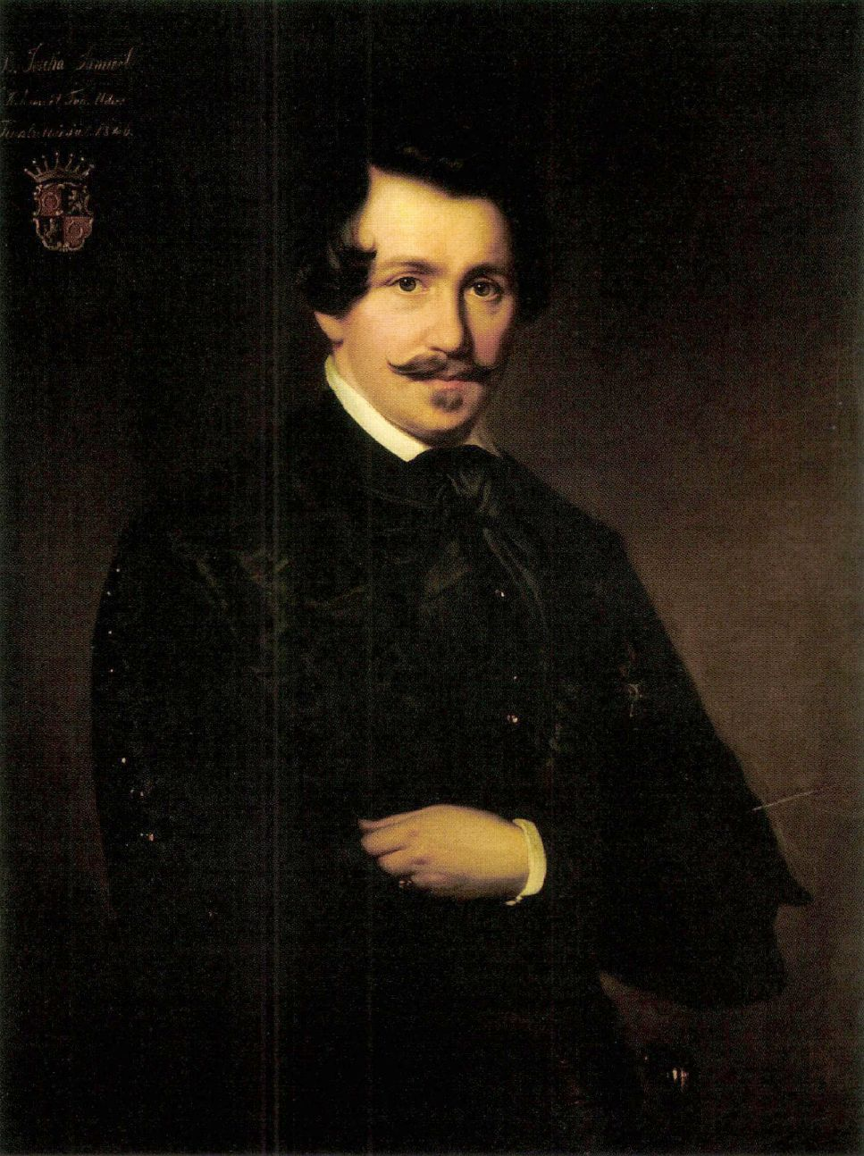 branyicskai báró Jósika Sámuel erdélyi kancellár.